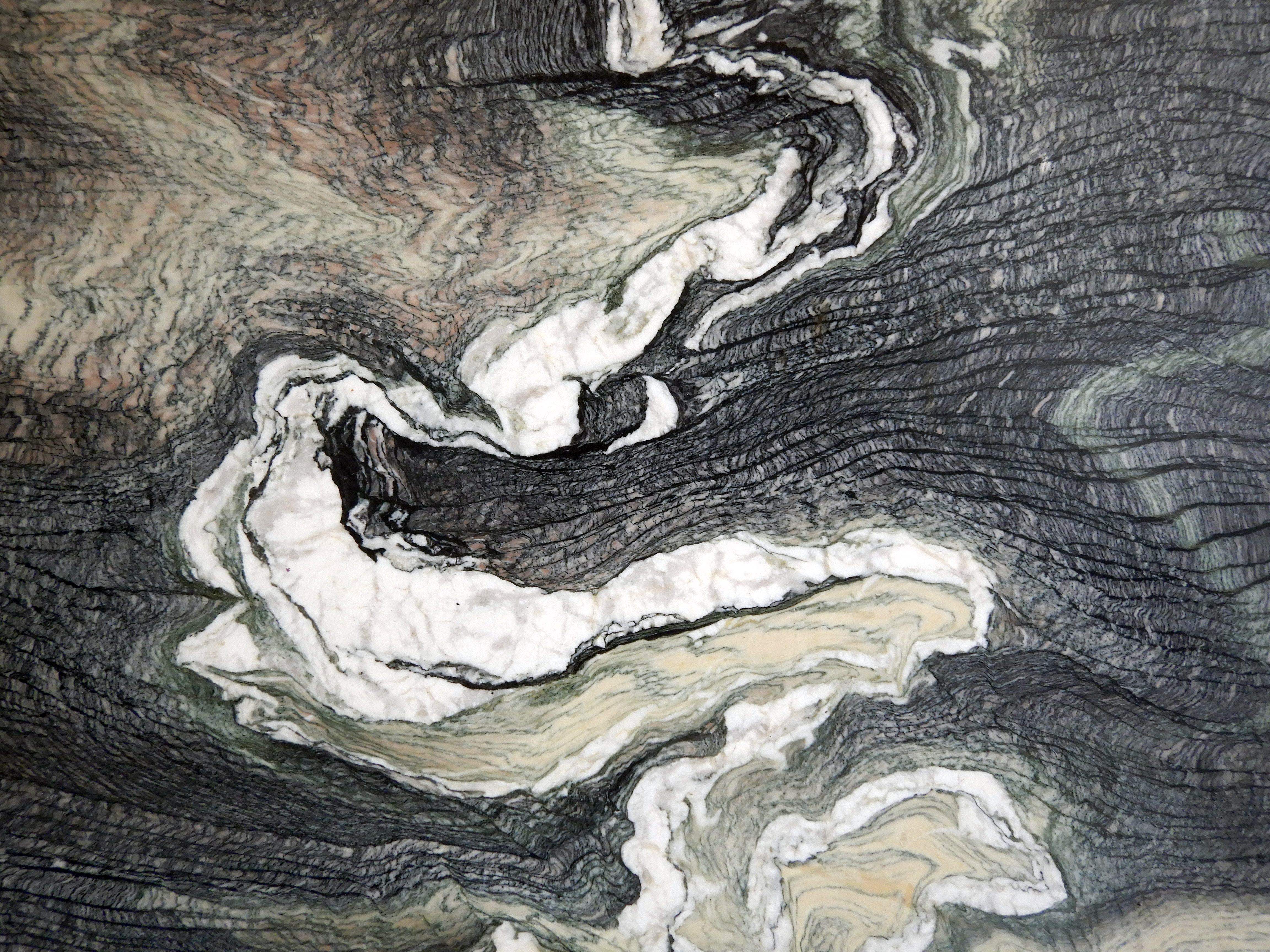 Parement de marbre décoratif , dans un bâtiment abritant des toilettes publiques à Nice, Provence-Alpes-Côte d'Azur, France.